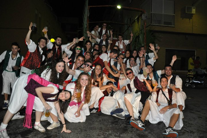 Fiesta tradicional de Santomera realizada el 6 de octubre.